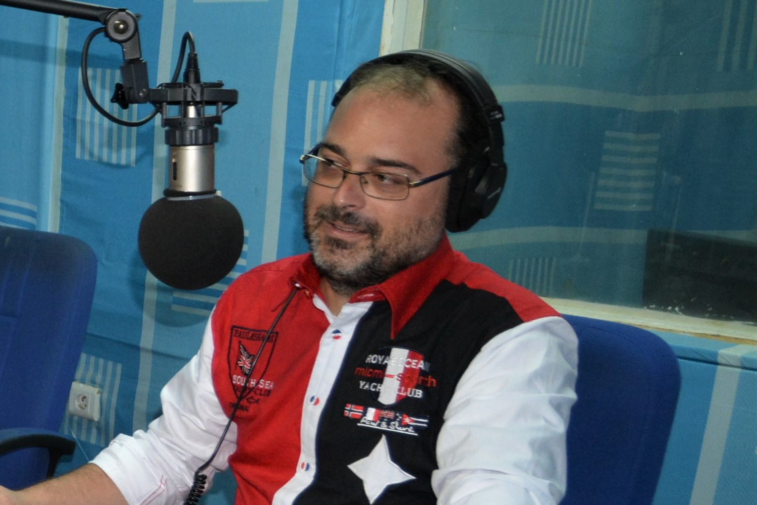 Dominique Trottier, au micro de Radio Okapi à Kinshasa (RDC), en 2015.